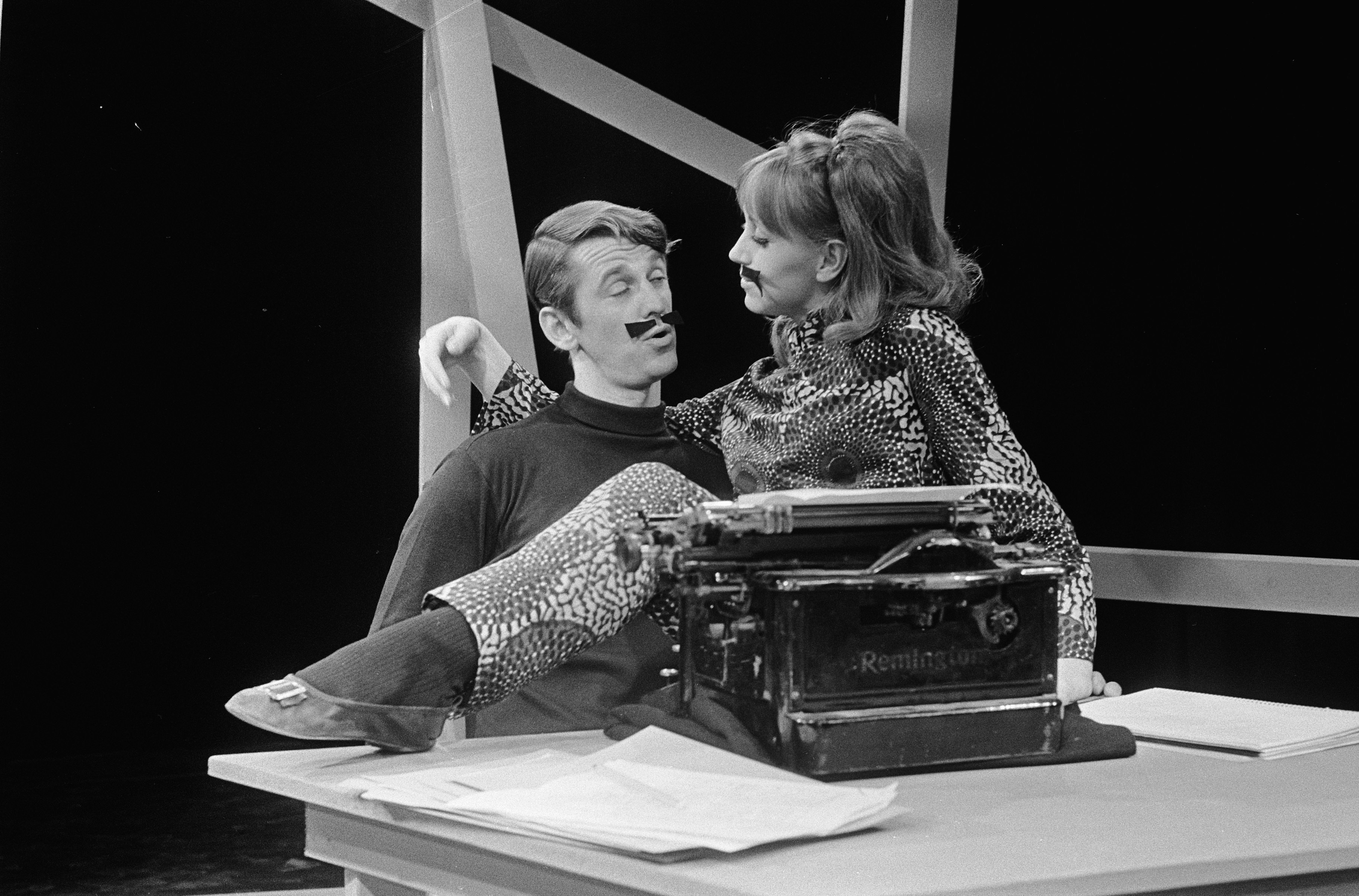 Collectie / Archief : Fotocollectie Anefo Reportage / Serie : [ onbekend ] Beschrijving : TV-spel eenakter "Muizen" geschreven door Gust Gils. Manfred de Graaf en Cocki Boonstra Datum : 6 november 1967 Trefwoorden : acteurs, televisiedrama's Persoonsnaam : Boonstra, Cocki, Graaf, Manfred de Fotograaf : Koch, Eric / Anefo Auteursrechthebbende : Nationaal Archief Materiaalsoort : Negatief (zwart/wit) Nummer archiefinventaris : bekijk toegang 2.24.01.05 Bestanddeelnummer : 920-8383